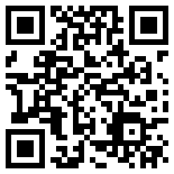 Código QR (Quick Response) de la siguiente dirección web